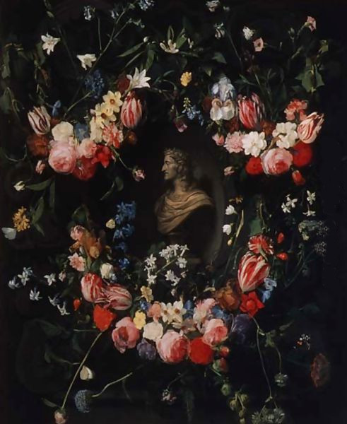 Rubens, bacco ebbro uffizi.jpg